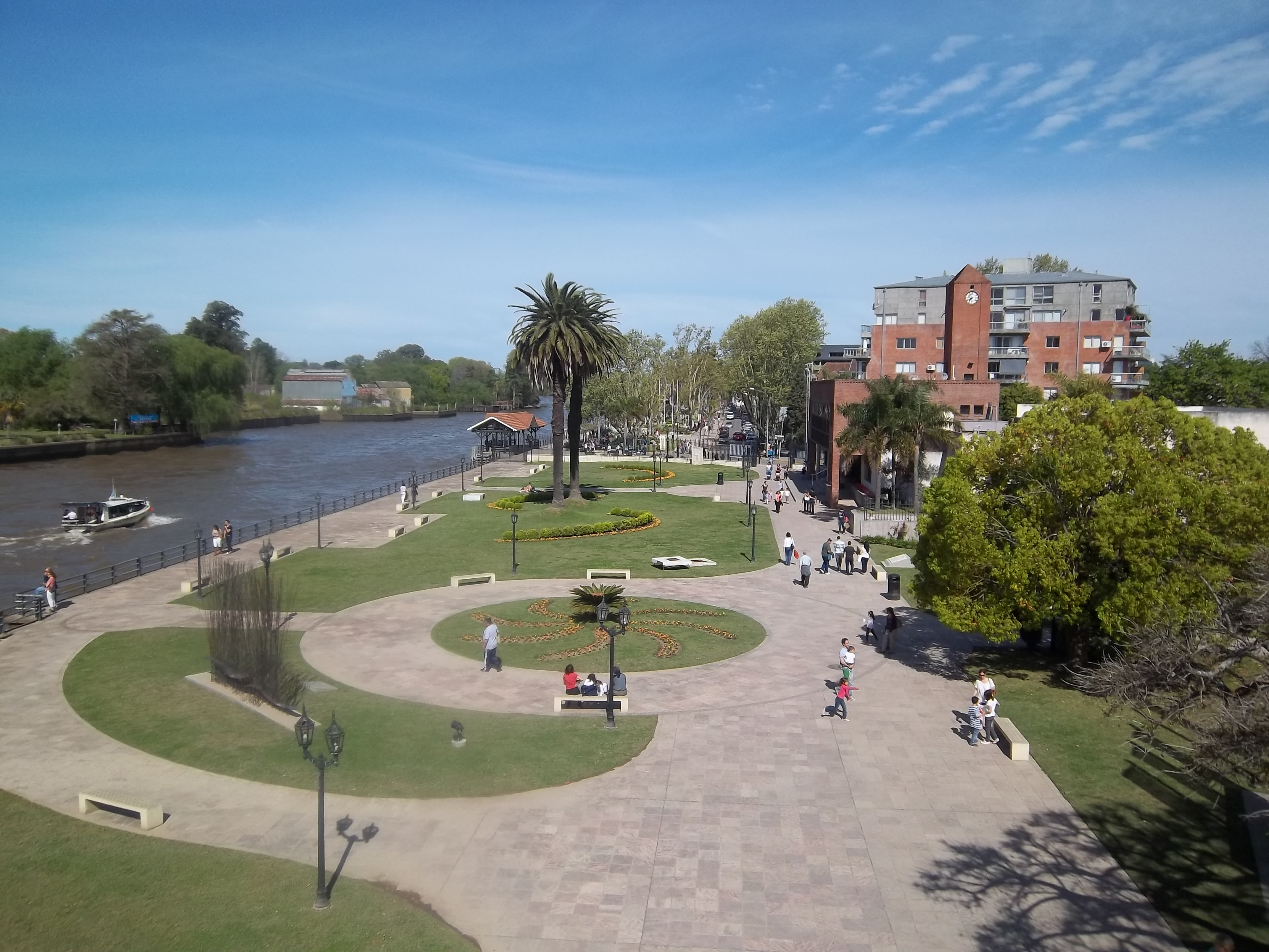 Parque junto al Museo de Arte Tigre y Río Luján. Ubicado en Tigre, provincia de Buenos Aires, Argentina.